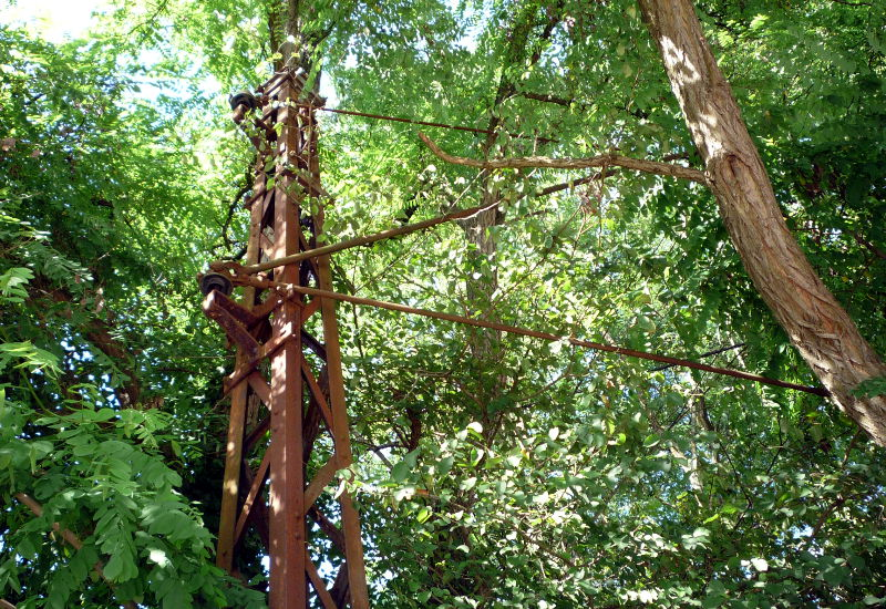 Im Jahre 2016 in Wallerfangen noch vorhandener Oberleitungsmast der ehemaligen Kleinbahn Ensdorf-Saarlouis-Wallerfangen